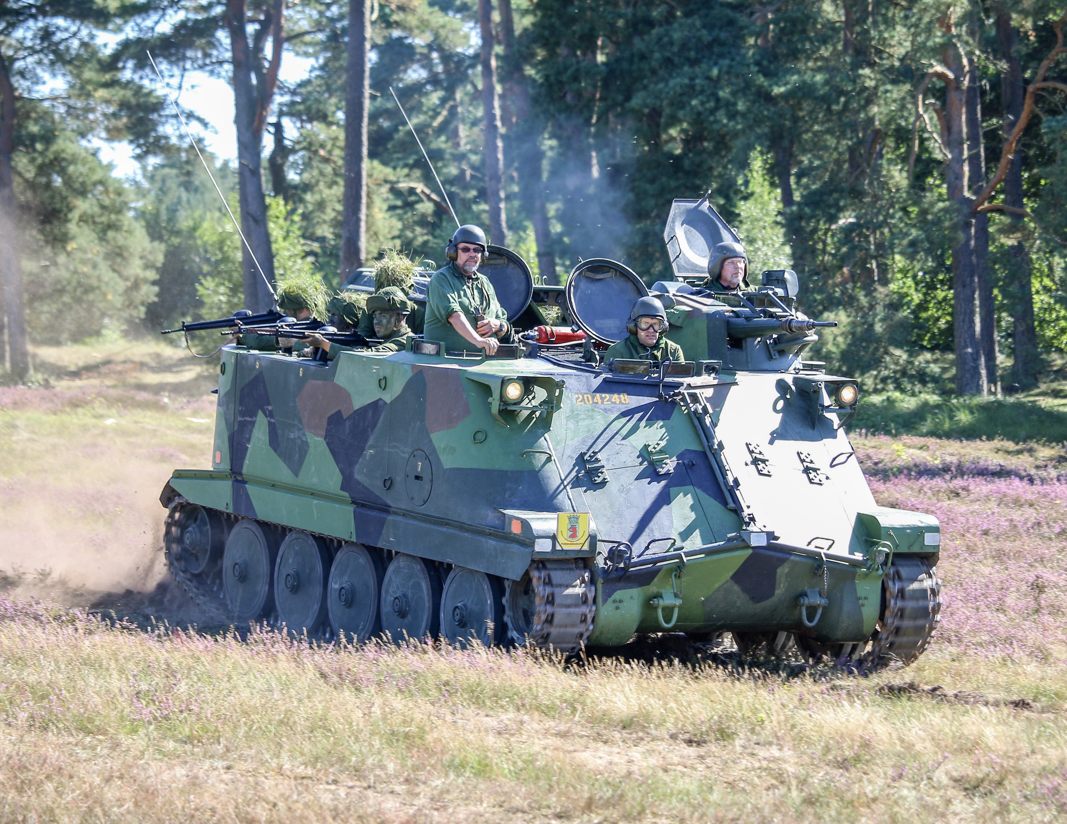 Pansarbandvagn 302 Revinge 2016